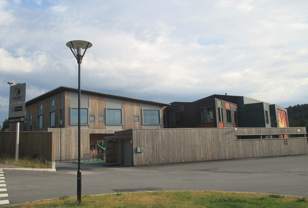 Hånes frikirke